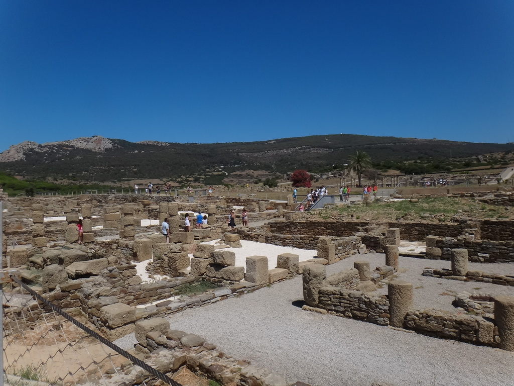 Baelo Claudia